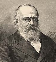 Кошелёв, Александр Иванович